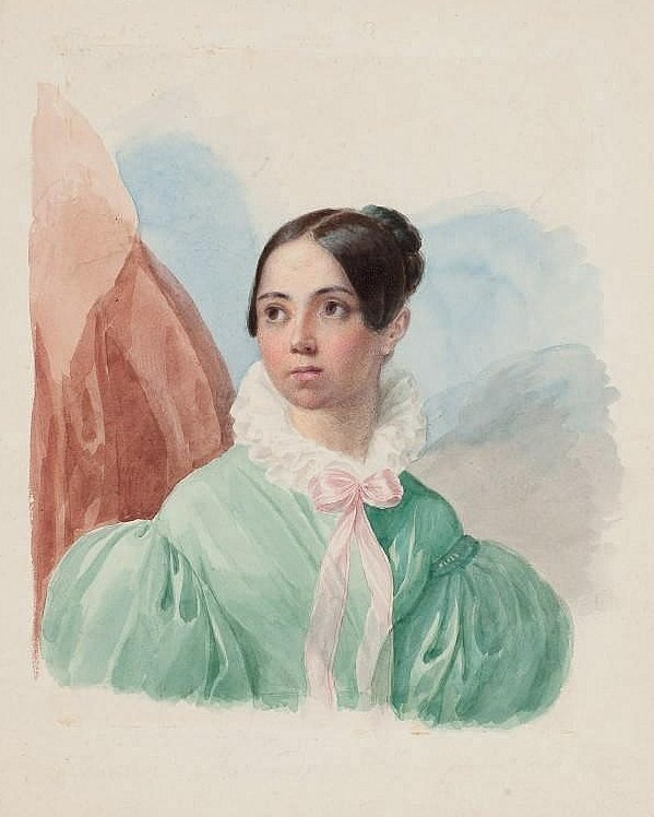 Прасковья Александровна Поторацкая, дочь. А. М. Полторацкого, жила в Москве, в собственном доме в Лёвшином переулке)